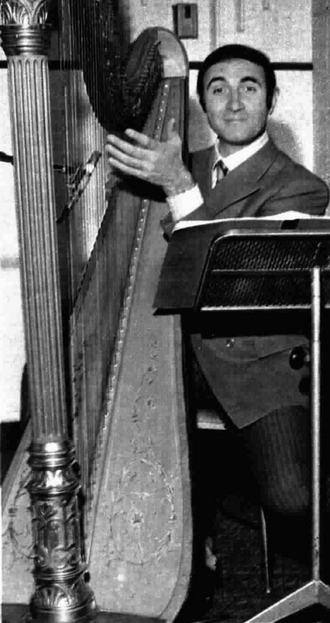 Italian tv-presenter Pippo Baudo